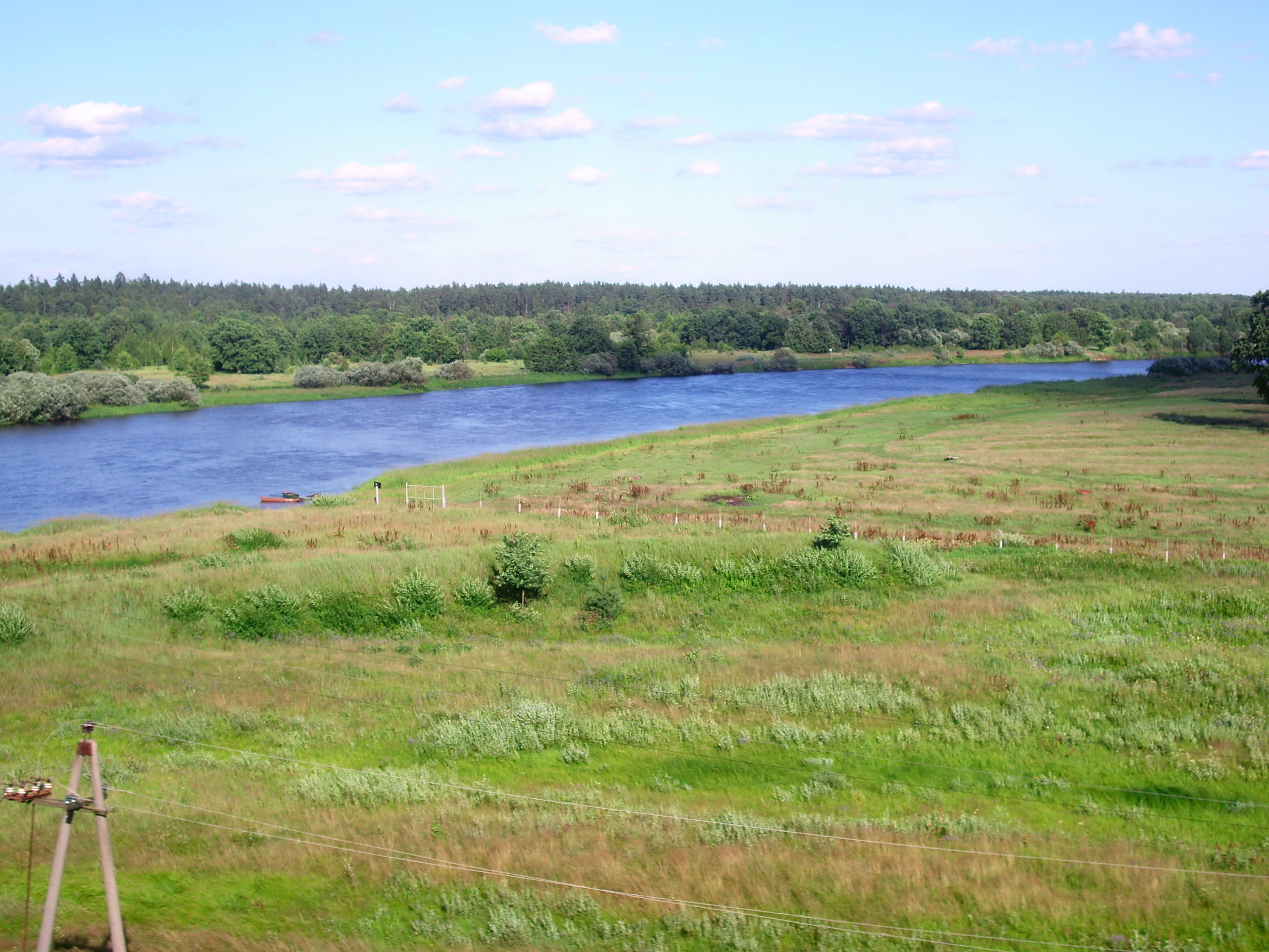 La Berezina, en Biélorussie